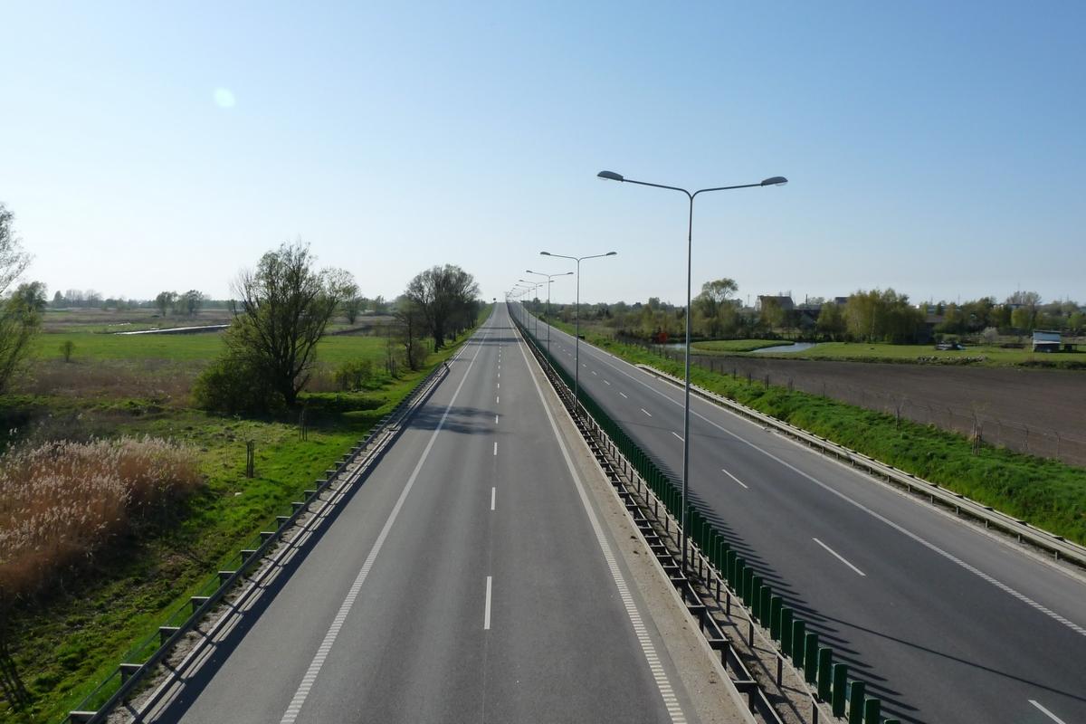 Obwodnica Elbląga - widok w kierunku Gdańska